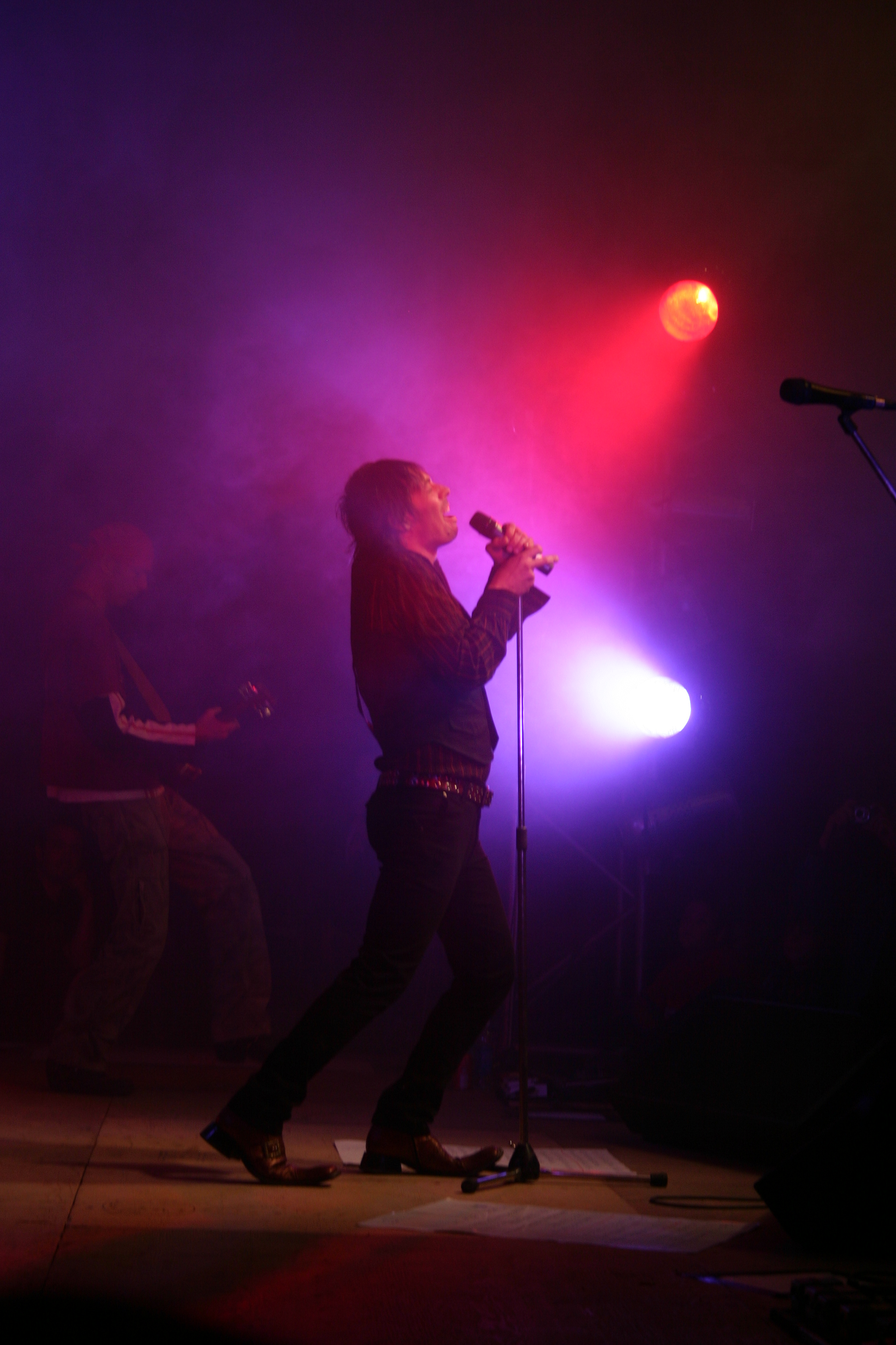 Stefie Shock, de son vrai nom Stéphan Caron, est un musicien, un interprète et un compositeur de rock canadien d'expression française. Il est né le 9 mars 1969 à Montréal, au Québec, au Canada.